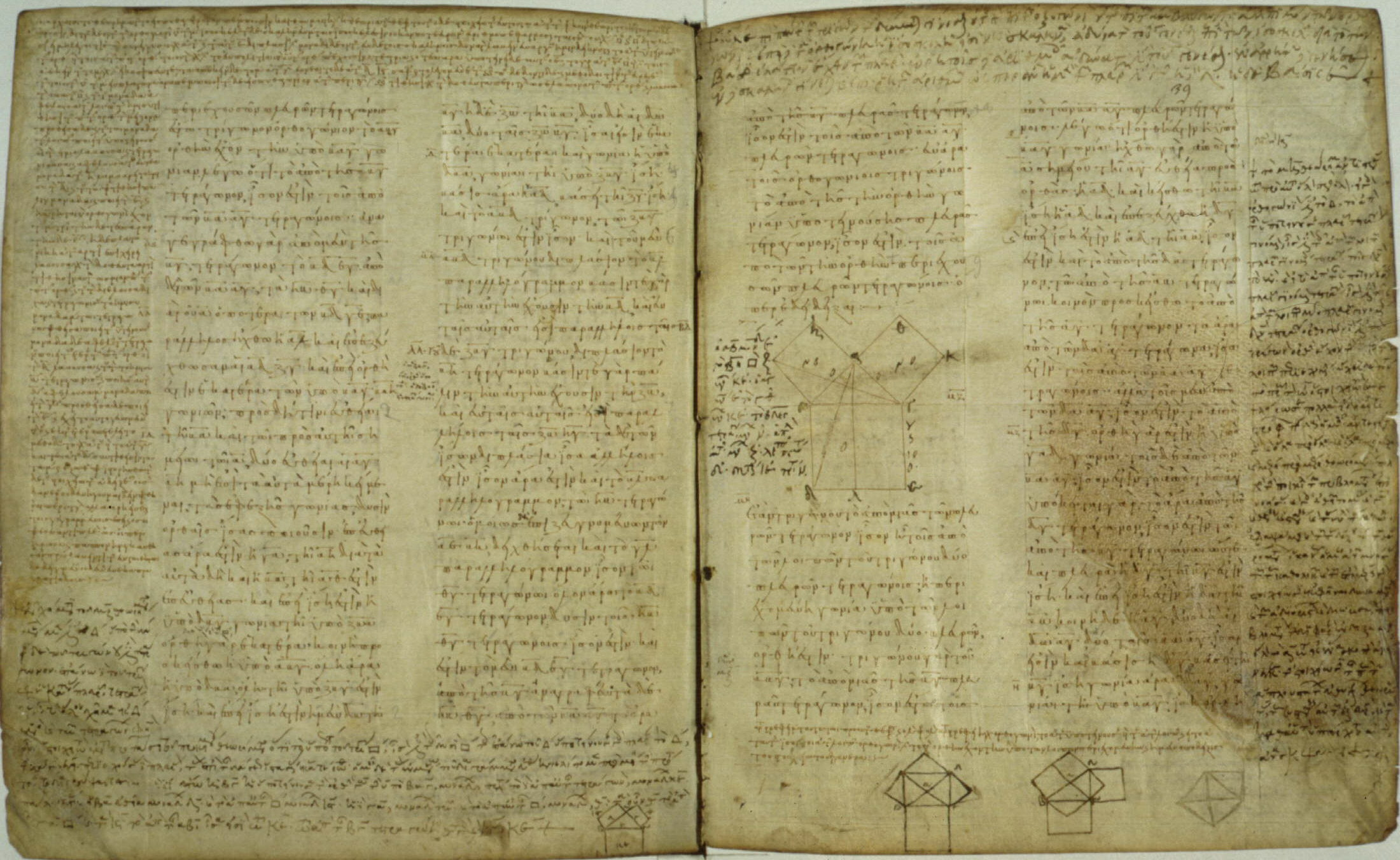 La prop. 47 del libro I di Euclide (il teorema di Pitagora), che si trova nel vol. 1 del manoscritto, ai fogli 38 verso - 39 recto